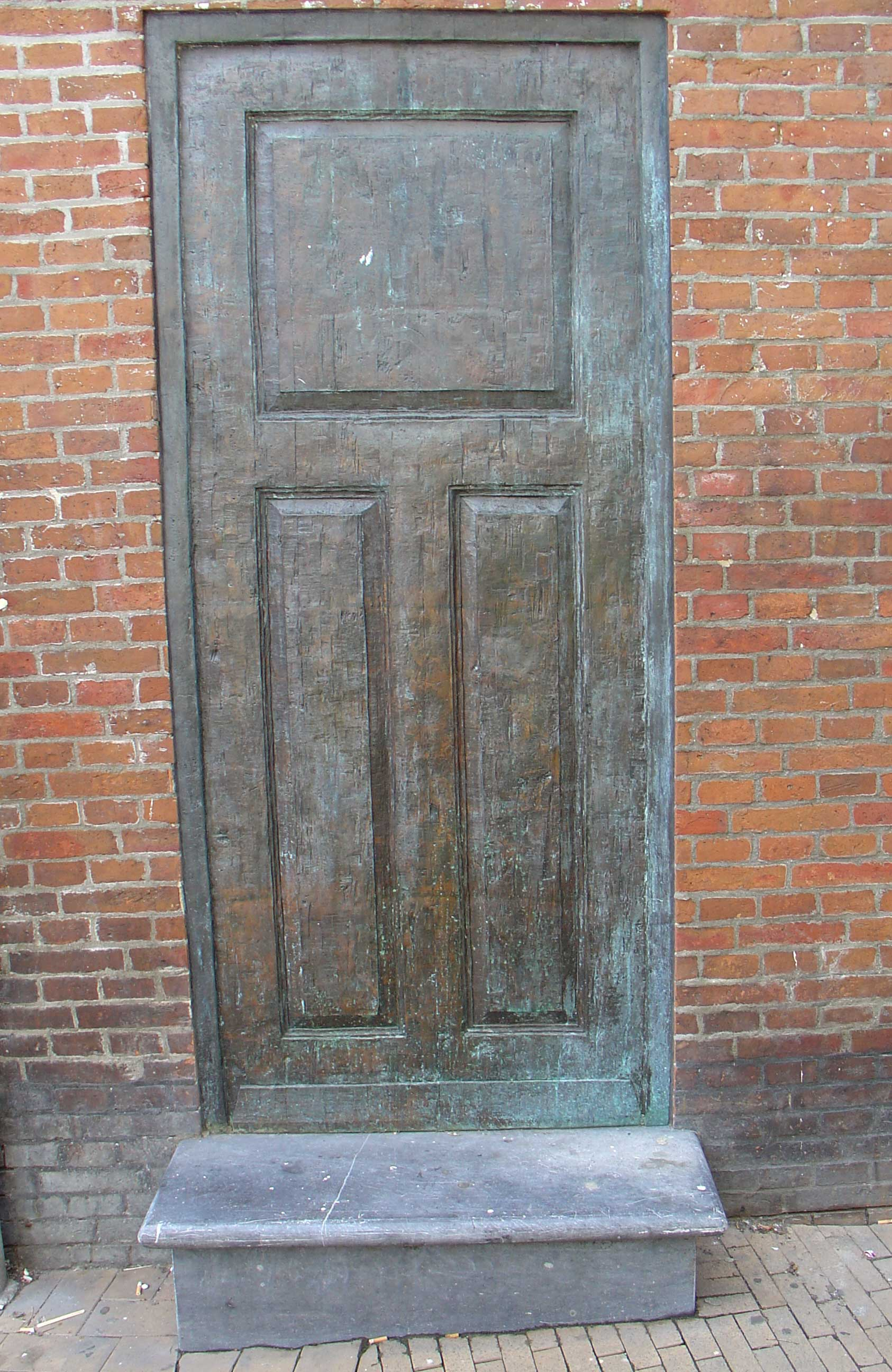 Portaal door Gert Sennema Folkingestraat Groningen